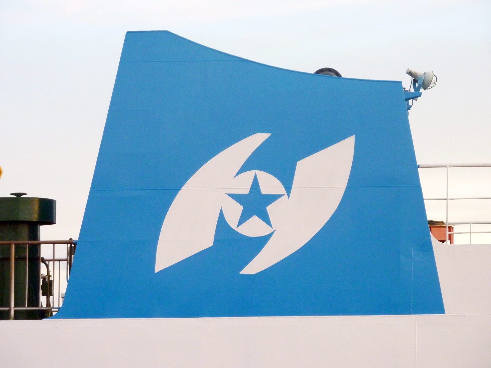 波照間海運のファンネルマーク（フェリーはてるま）